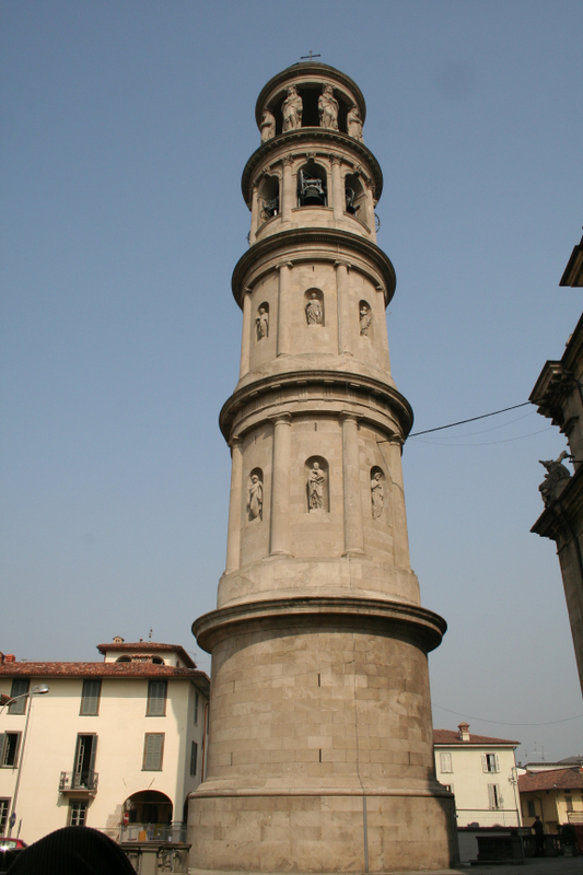 Urgnano, Campanile di Luigi Cagnola, eretto nel 1824-29.